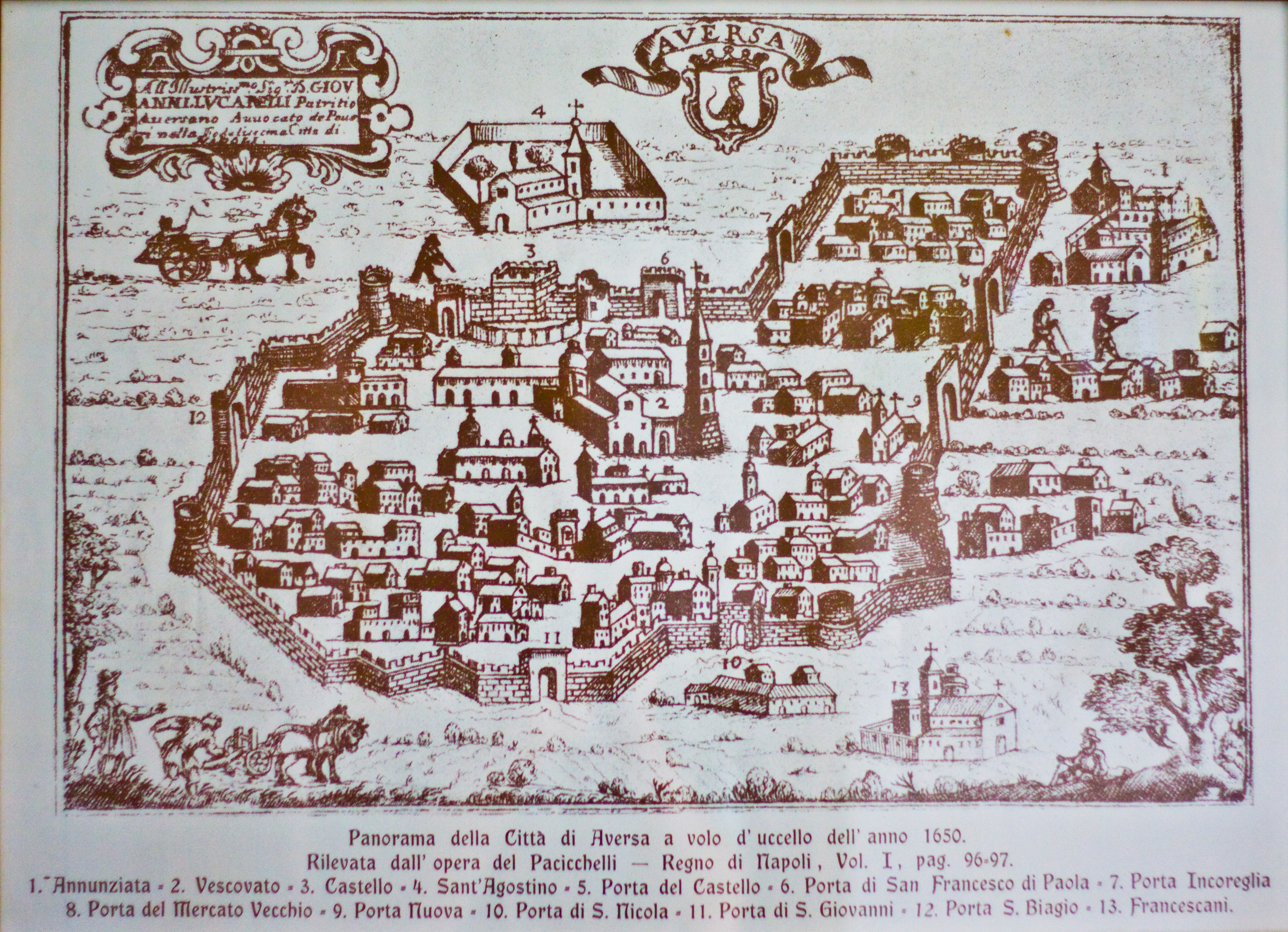 Panorama della Città di Aversa a volo d'uccello dell'anno 1650, dall'opera del Pacichelli nel libro Il Regno di Napoli in Prospettiva